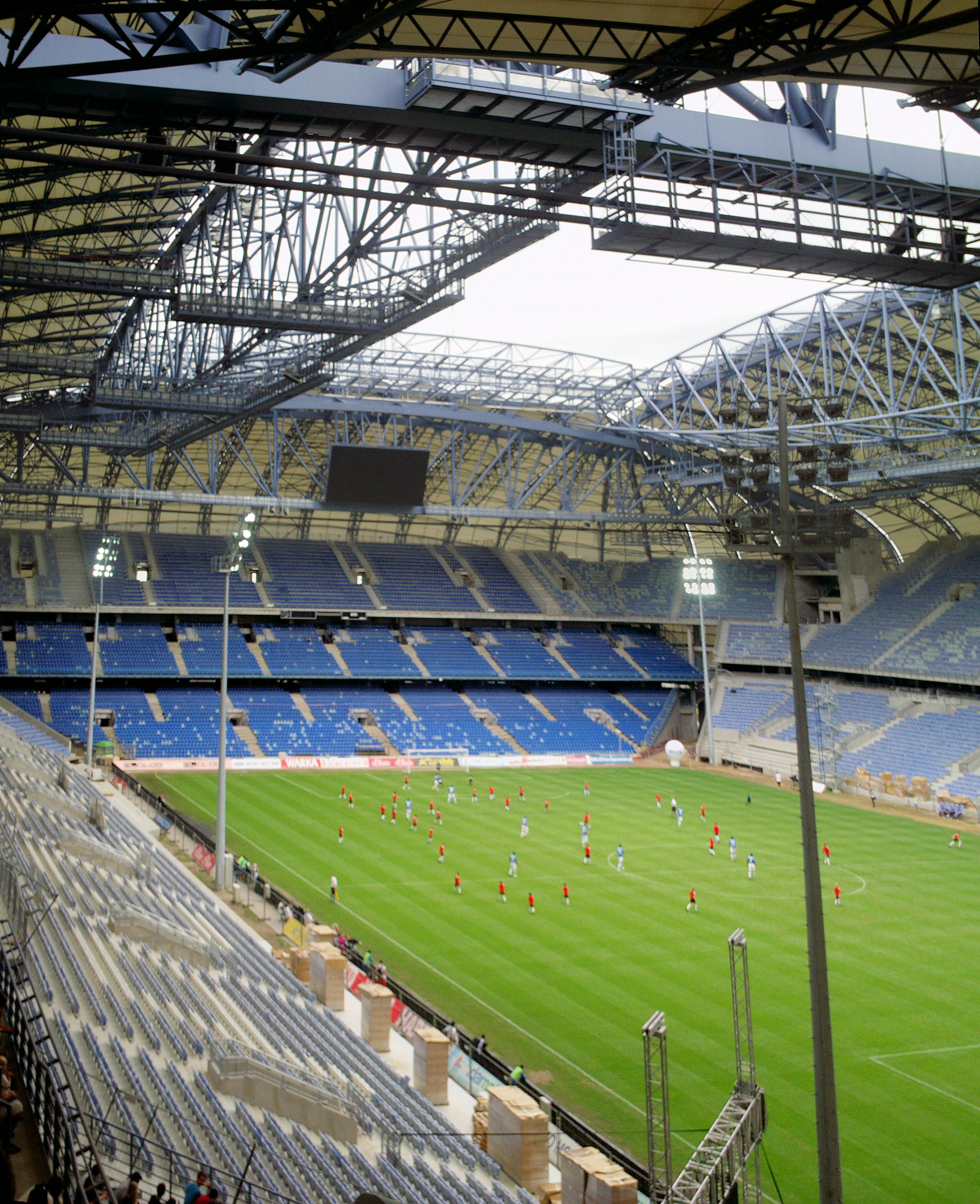 Stadion Miejski w Poznaniu w trakcie meczu pokazowego Lecha Poznań z dziećmi.